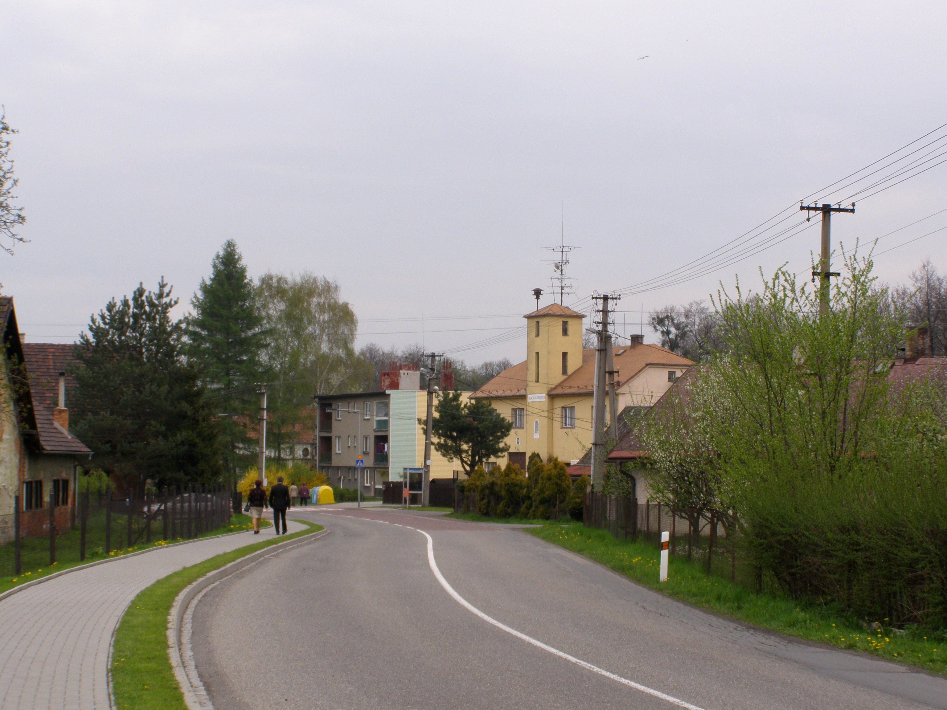 Česky: Pržno, hasičská zbrojnice